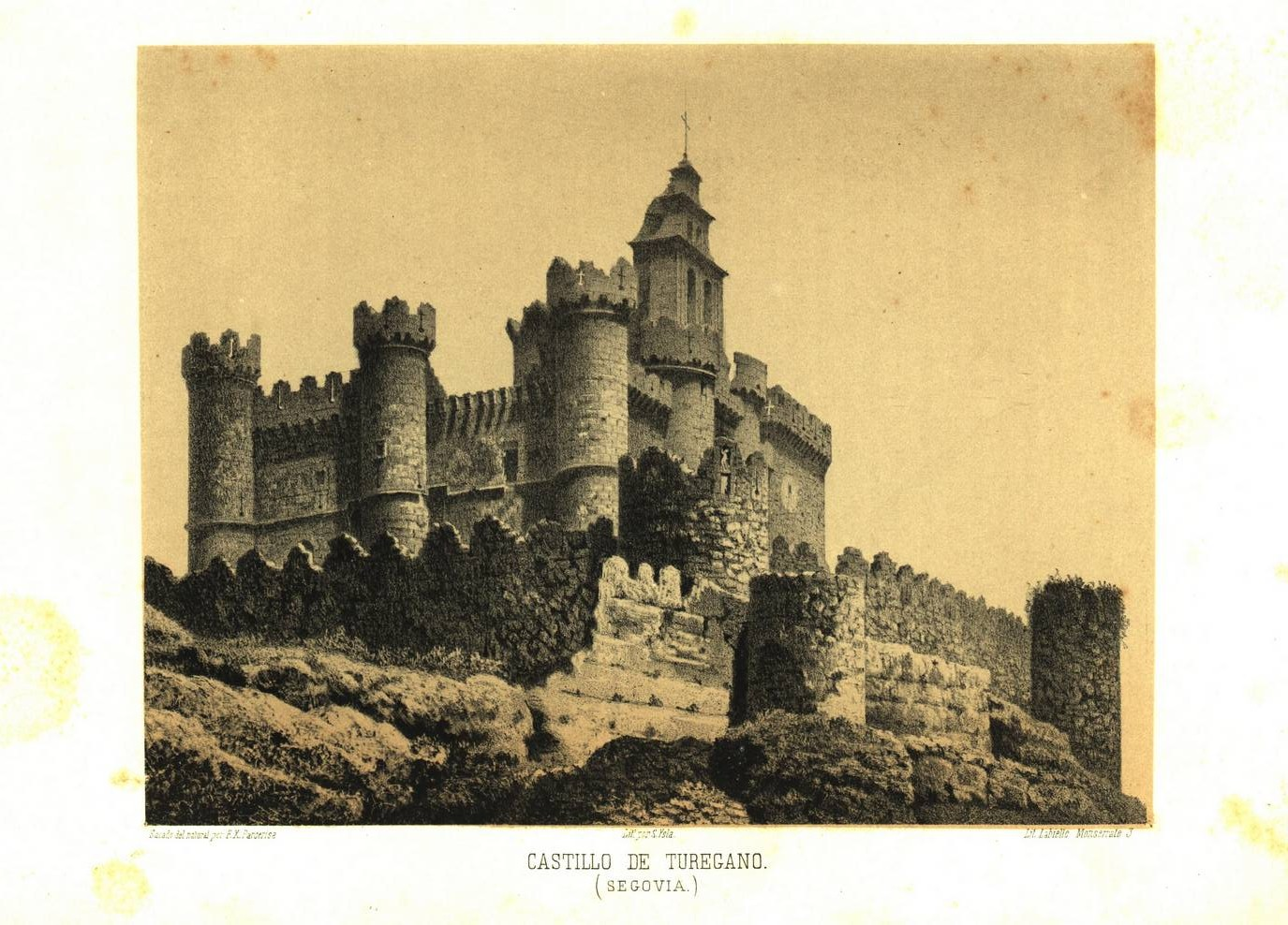 Castillo de Cuéllar